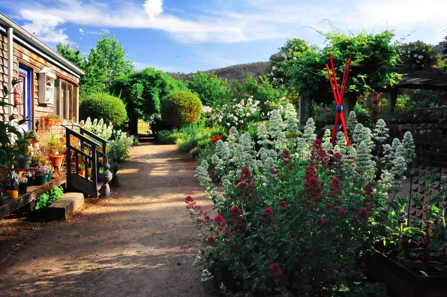 Garden, Australia